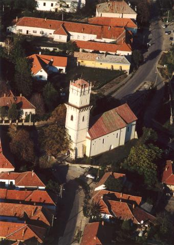 Olaszliszka, Hungary, aerialphotography